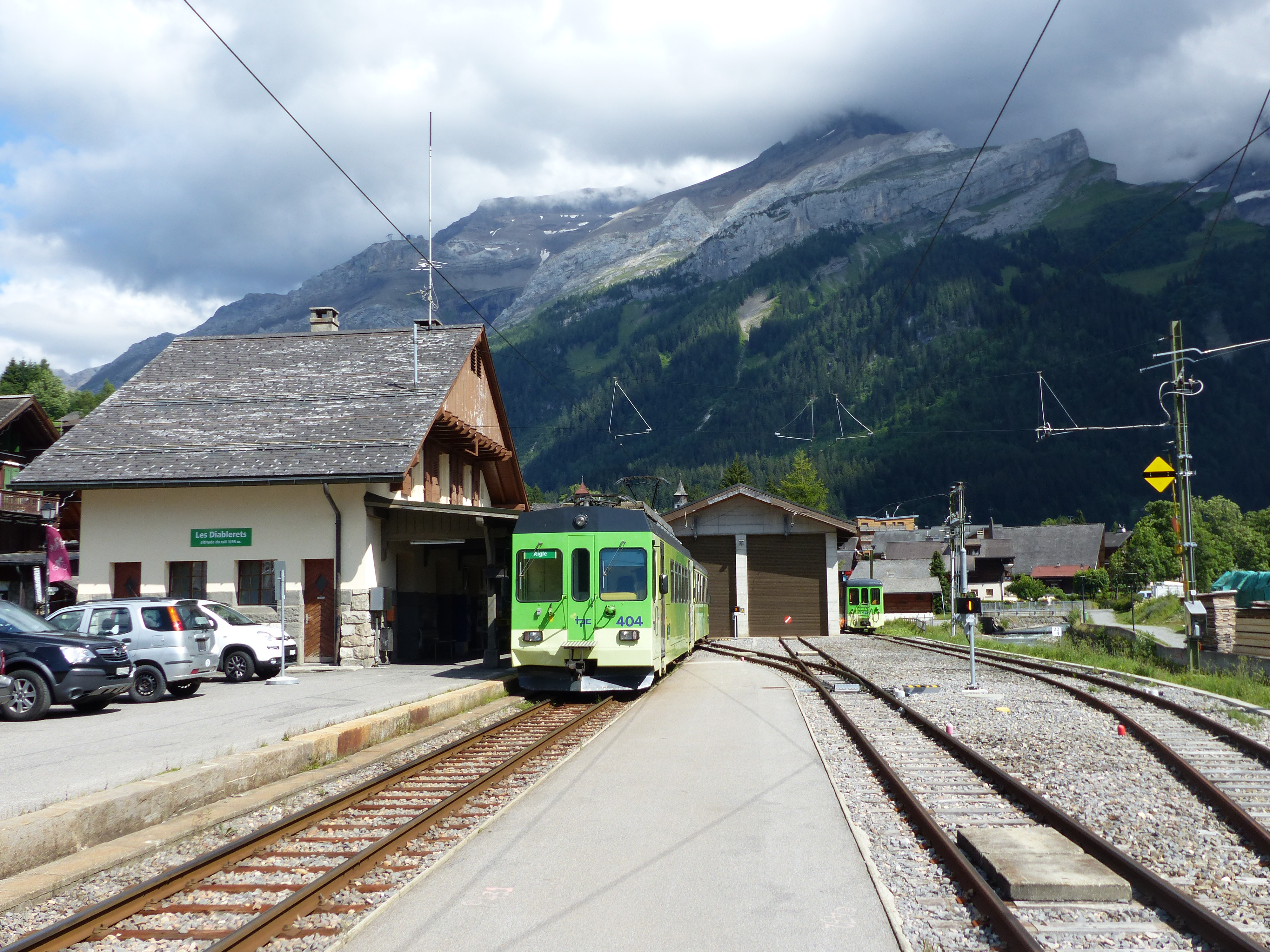 Les Diablerets, Bahnhof